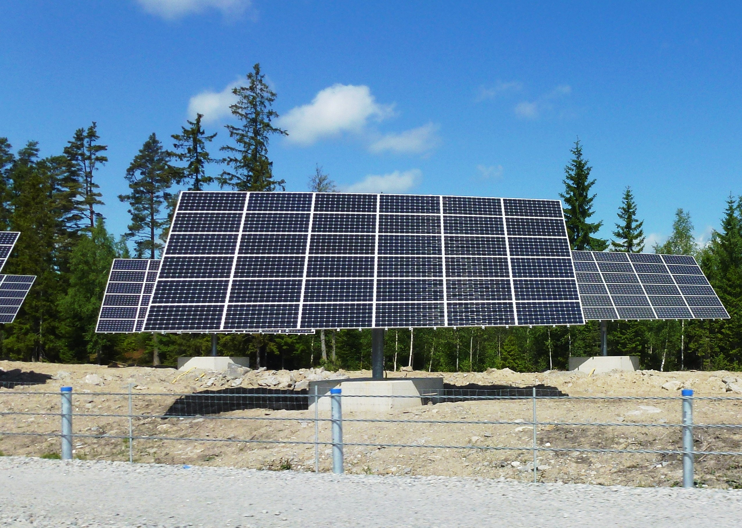 Mälarenergis och Kraftpojkarnas "Solpark" vid Västerås